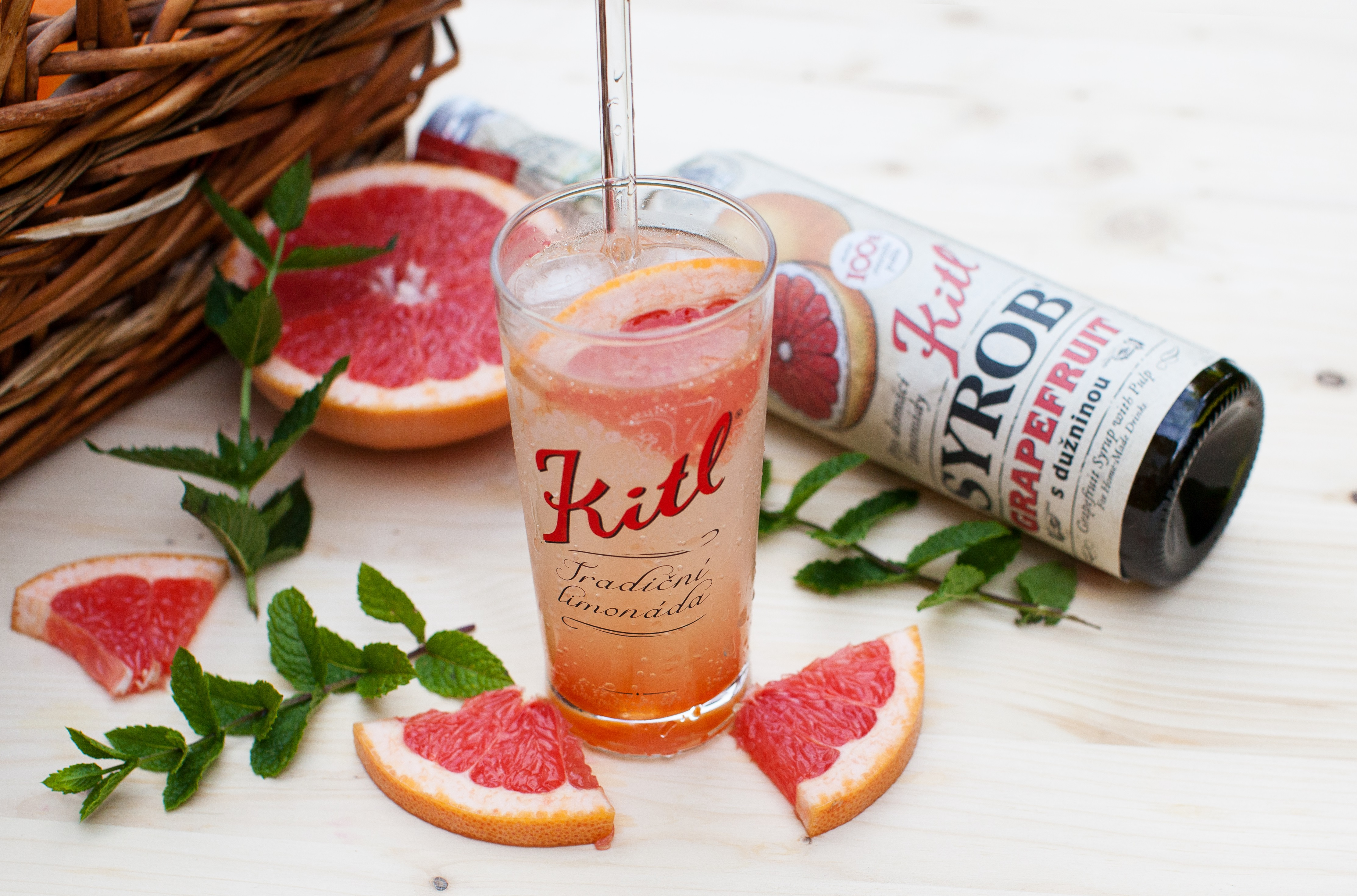 Grapefruitový sirup od firmy Kitl